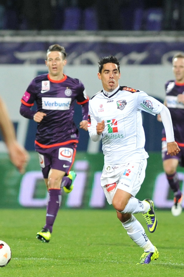 Bundesliga:FK Austria Wien - RZ Pellets WAC David De Paula Gallardo